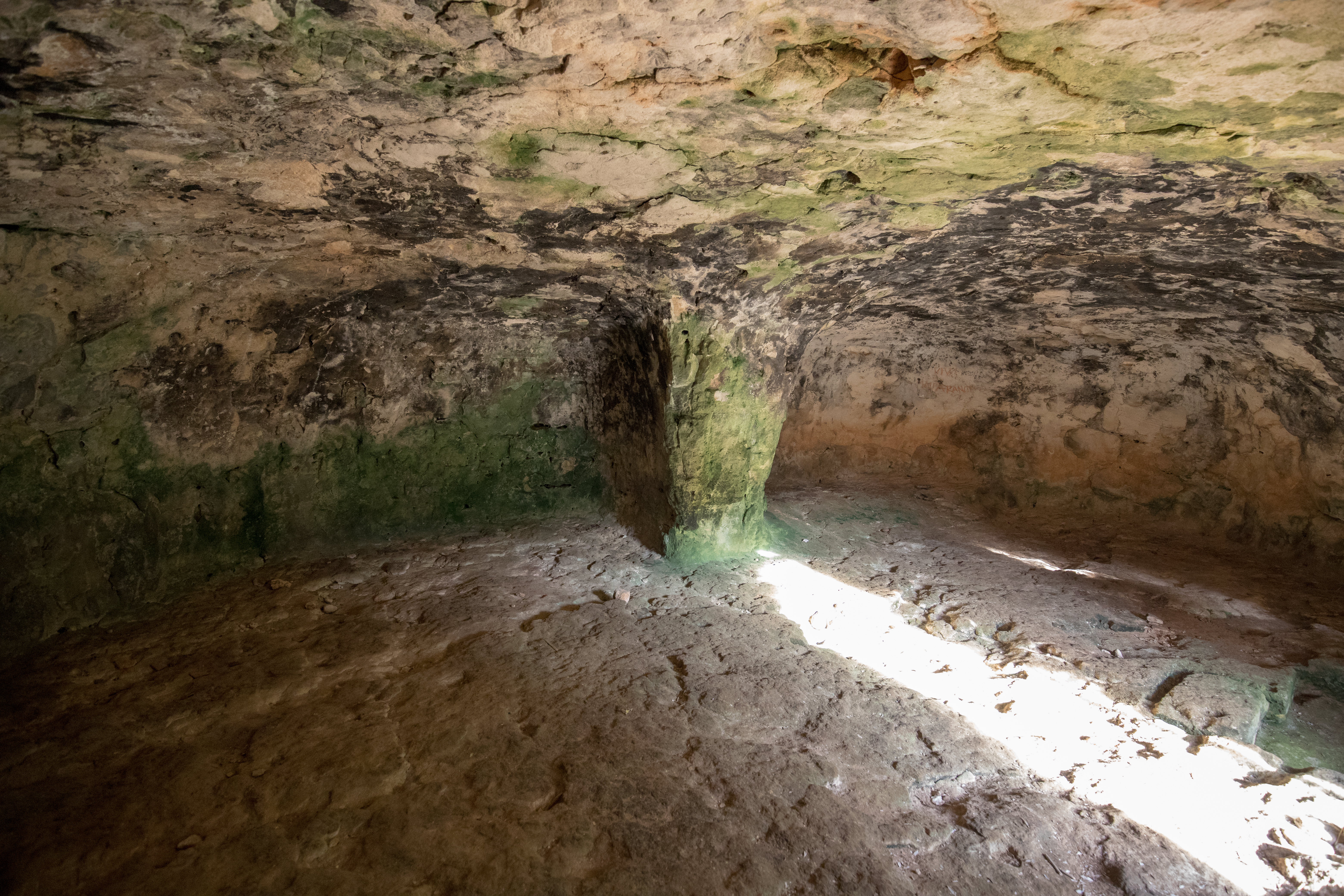 Interior d'un hipogeu de la Necròpolis de Calescoves